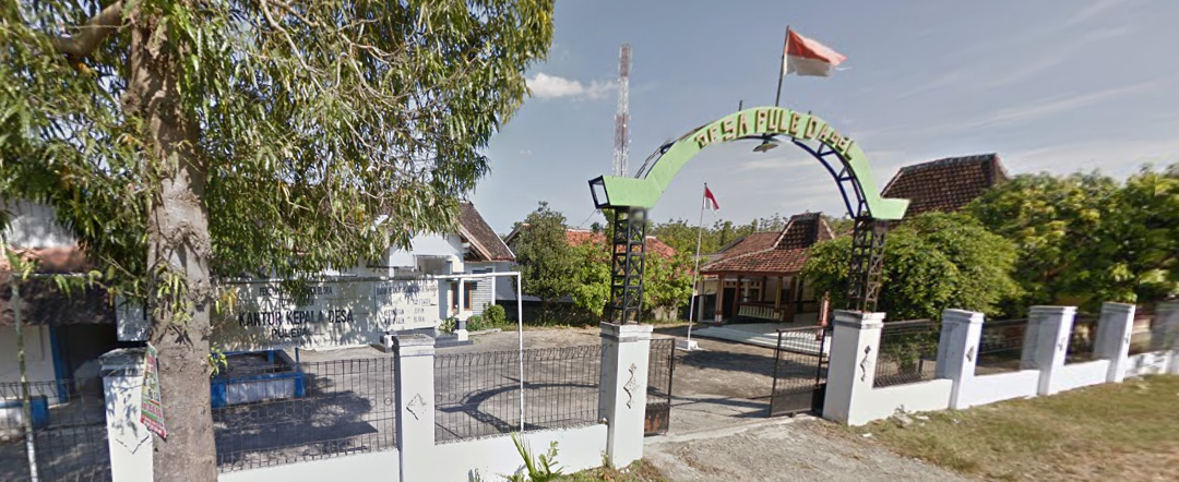 Balai Desa Puledagel